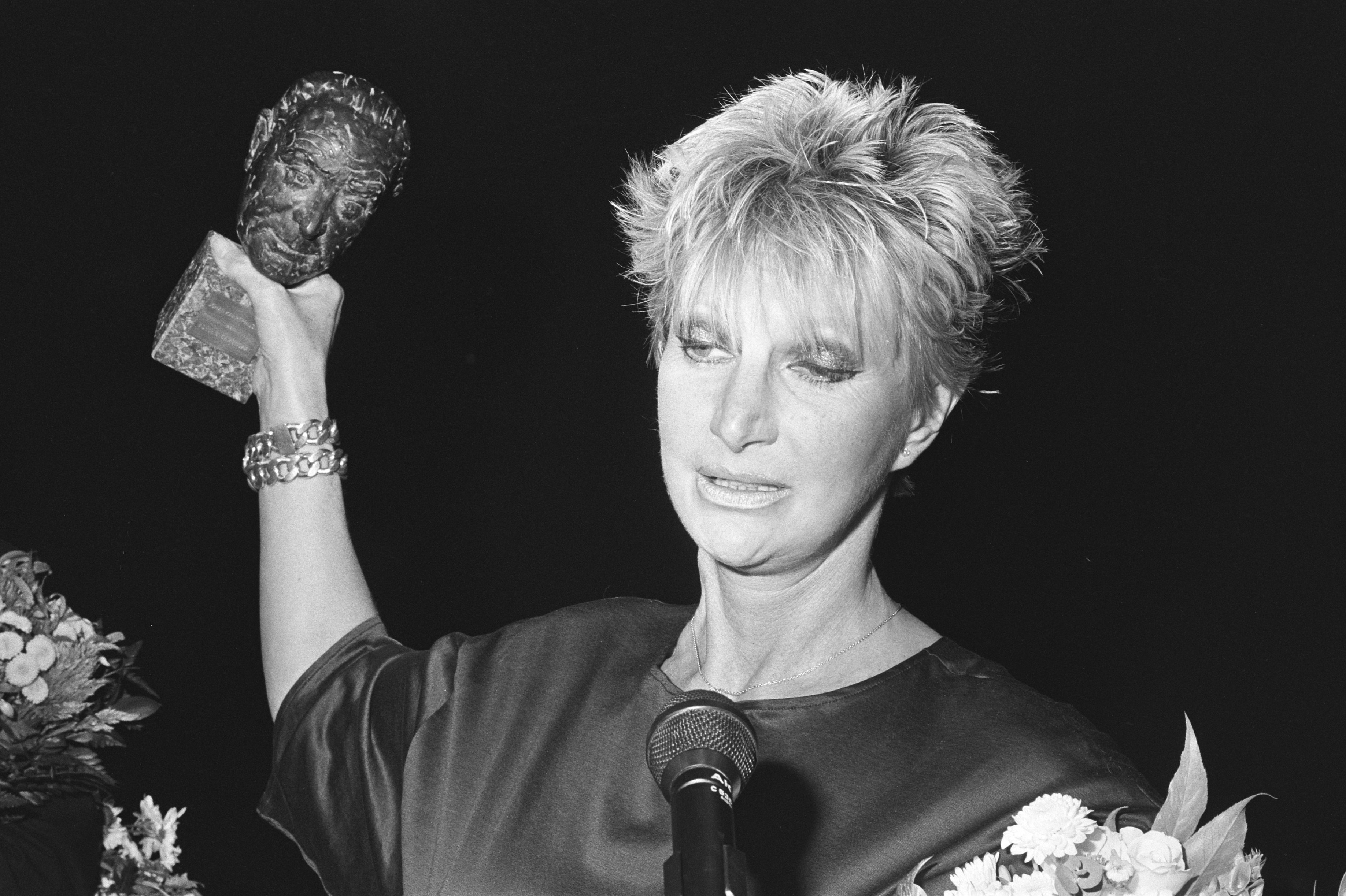 Collectie / Archief : Fotocollectie Anefo Reportage / Serie : Uitreiking van de Johan Kaartprijs 1983 aan Adèle Bloemendaal Datum : 24 oktober 1983 Trefwoorden : acteurs, cabaretiers, onderscheidingen, prijsuitreikingen Persoonsnaam : Bloemendaal, Adèle Fotograaf : Bogaerts, Rob / Anefo Auteursrechthebbende : Nationaal Archief Materiaalsoort : Negatief (zwart/wit) Nummer archiefinventaris : bekijk toegang 2.24.01.05 Bestanddeelnummer : 932-7422